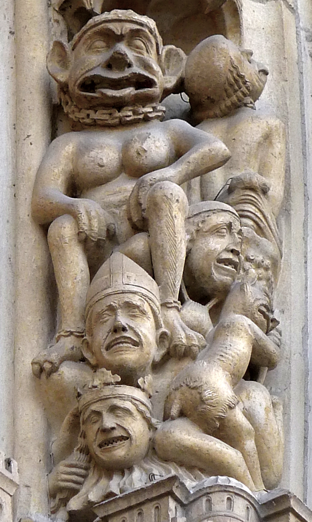 Bas-relief représentant une scène de l'enfer de l'archivolte du Jugement Dernier (façade ouest de Notre-Dame de Paris) - Paris IV